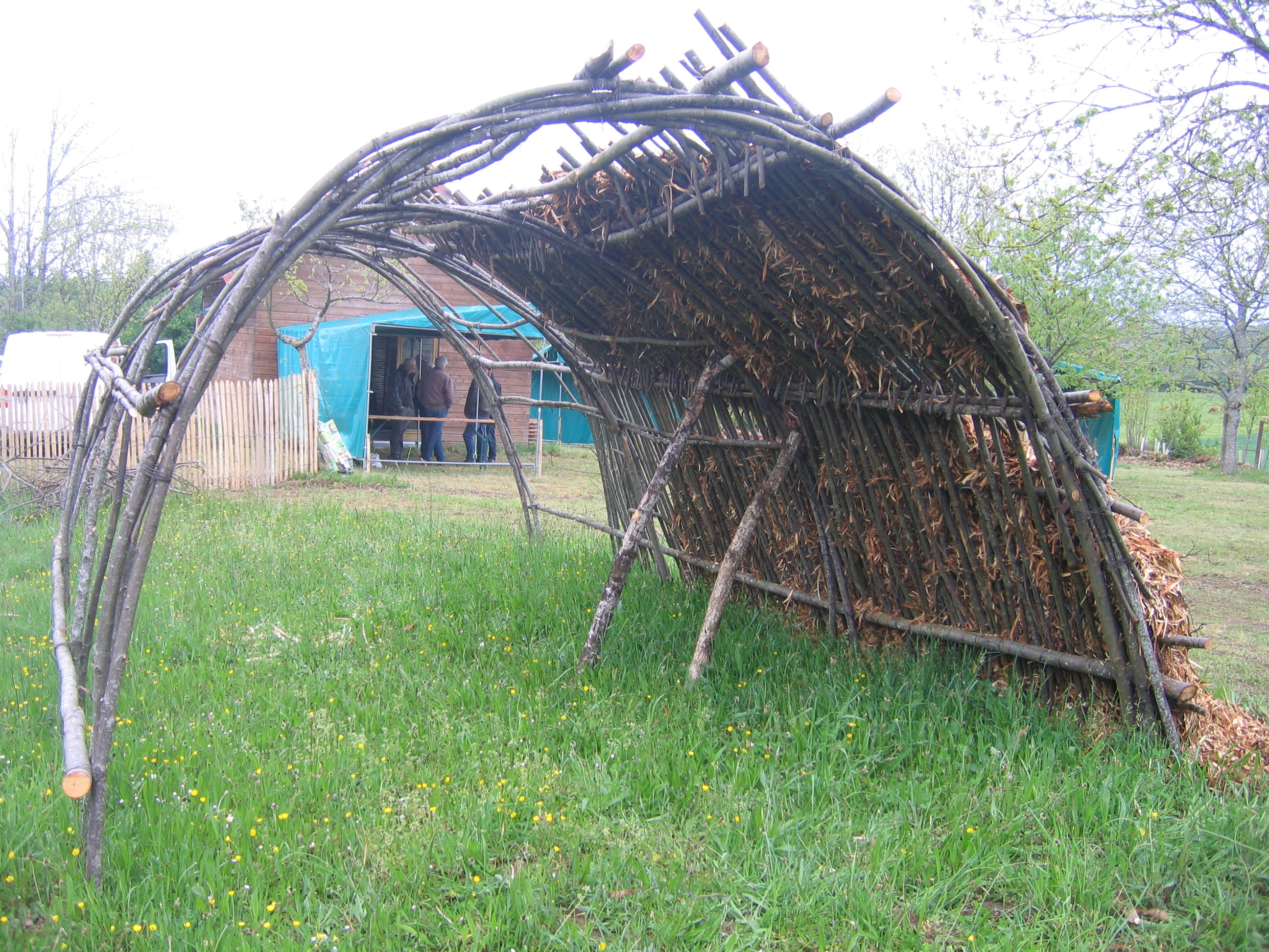 Cabanne de feuillardier au verger de conservation de Dournazac - Limousin. 2019